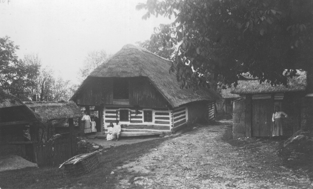 Hiša v Gornjih Ziljah